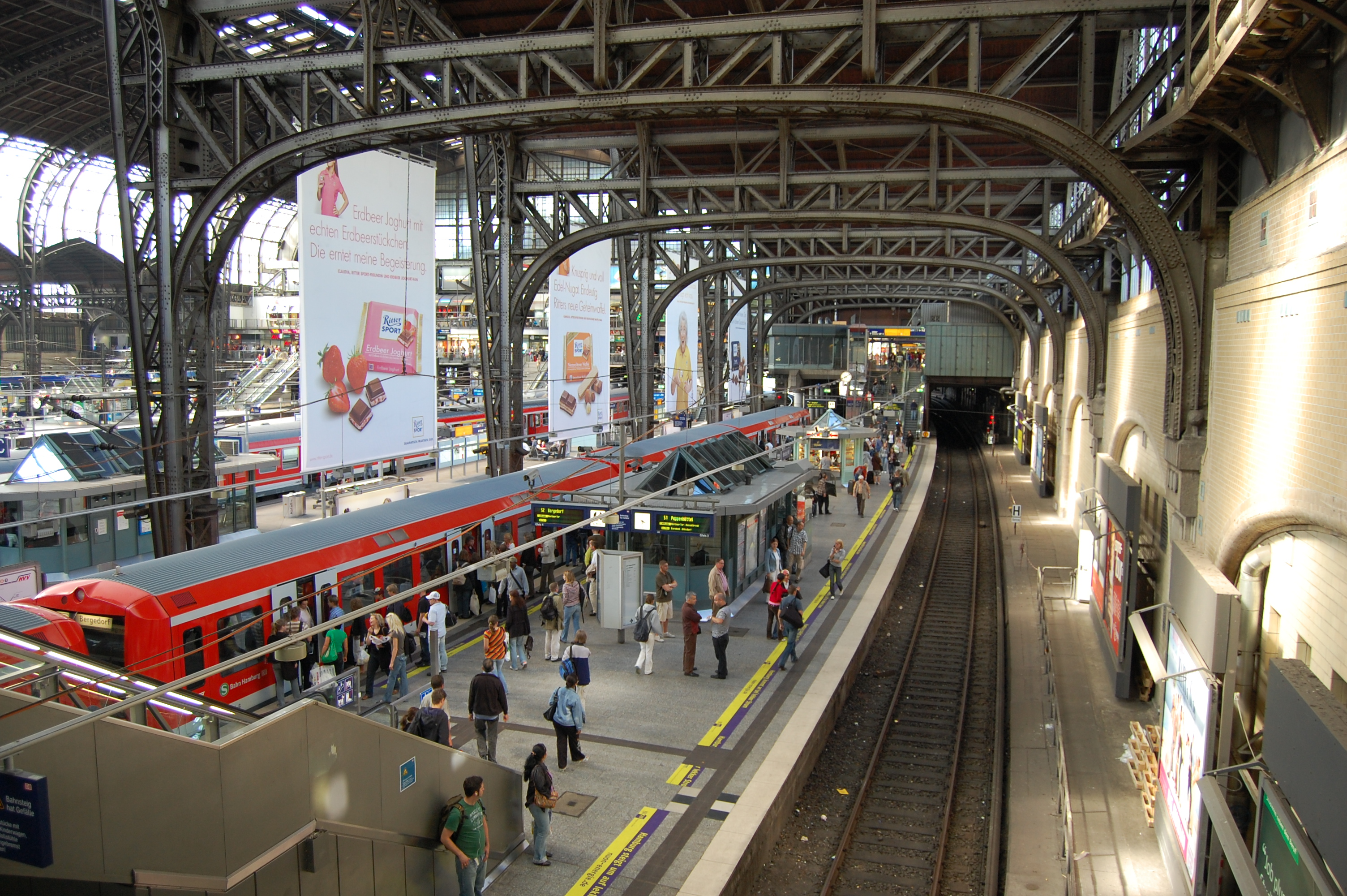 S-Bahn Gleise im Hamburger Hauptbahnhof